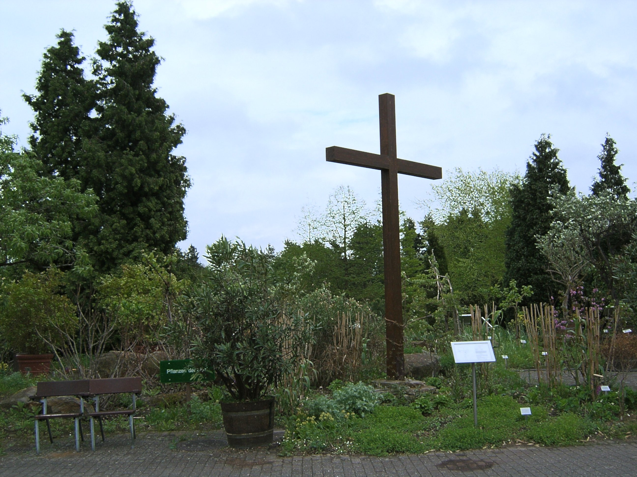 Hamburg, Klein Flottbek, Botanischer Garten, Bibelgarten